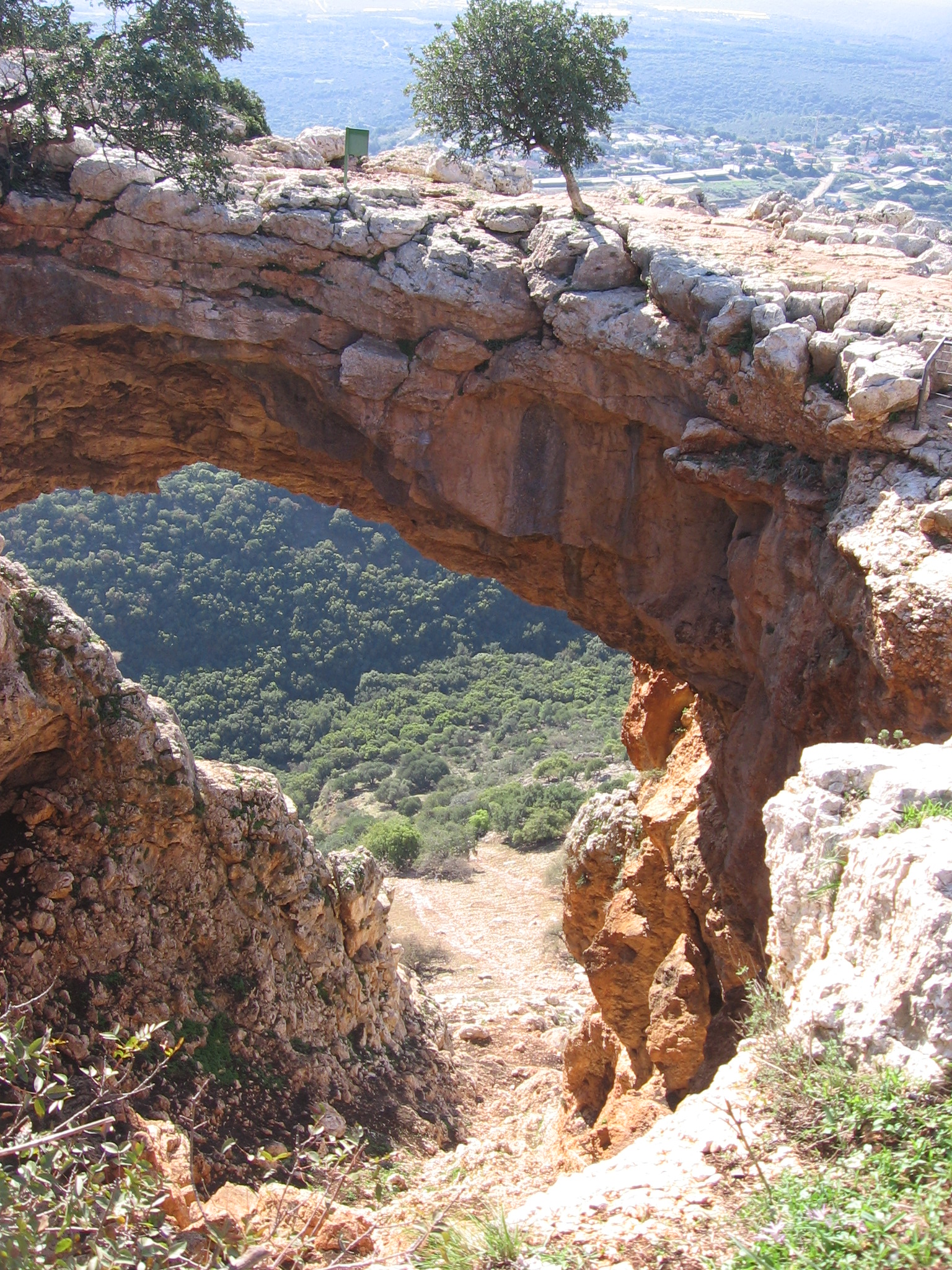 צילום מערת קשת בזווית רחבה במאונך - מצפון כלפי דרום